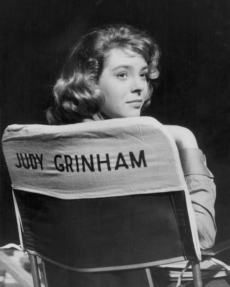 1958 PRESS PHOTO OLYMPIC SWIM CHAMP JUDY GRINHAM TRYING OUT HER ACTING SKILLS